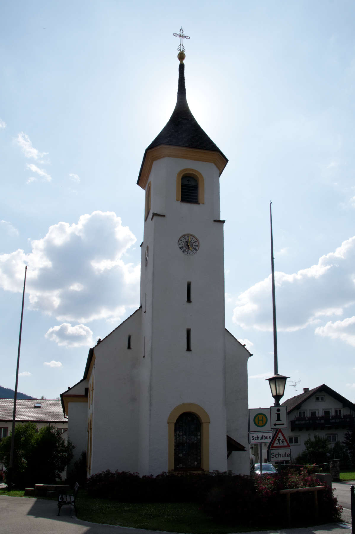 Saulgrub, Katholische Pfarrkirche St. Anton im Ortsteil Altenau